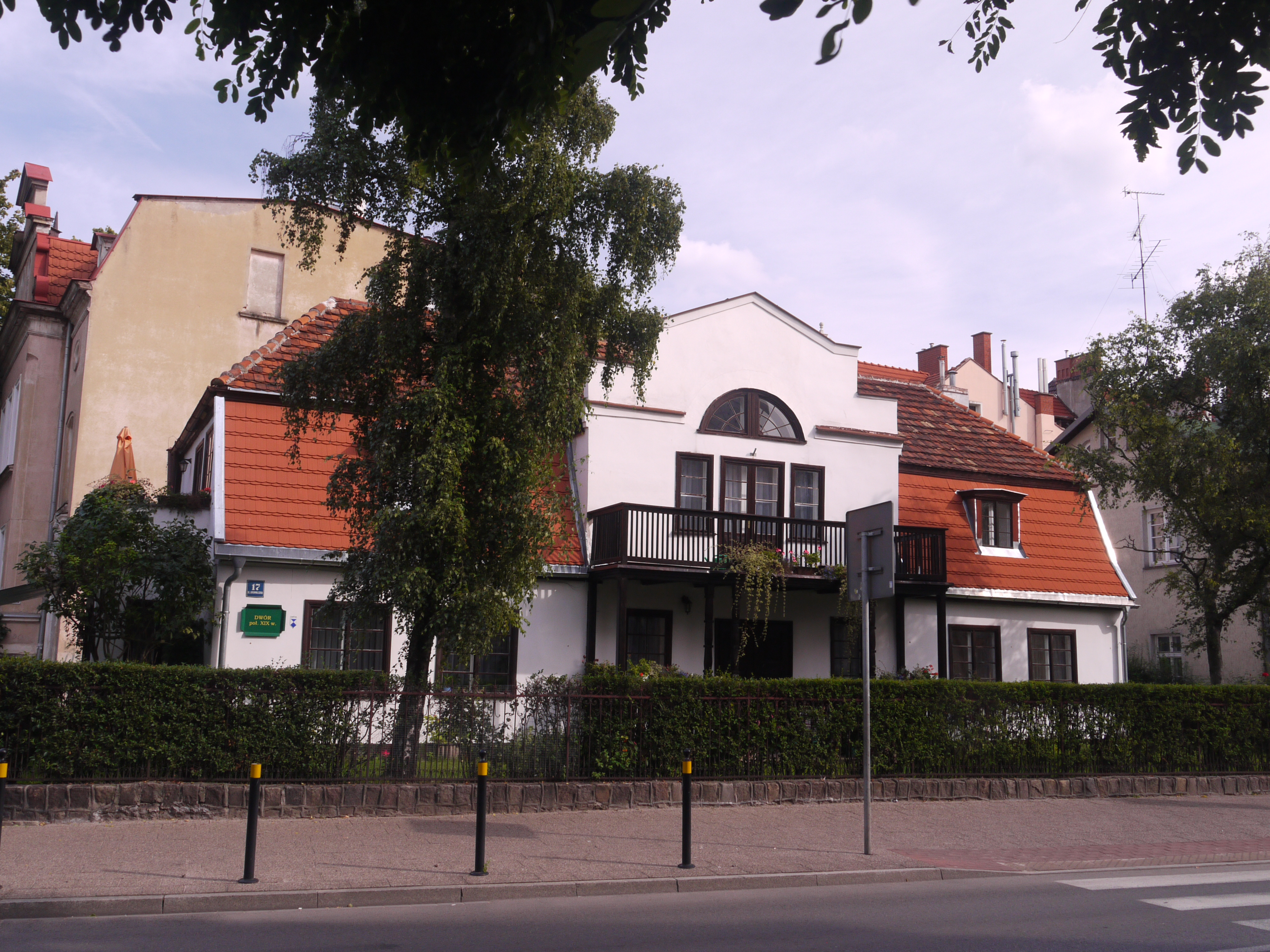 Dom - widok od frontu; ul. Grunwaldzka 17, Sopot